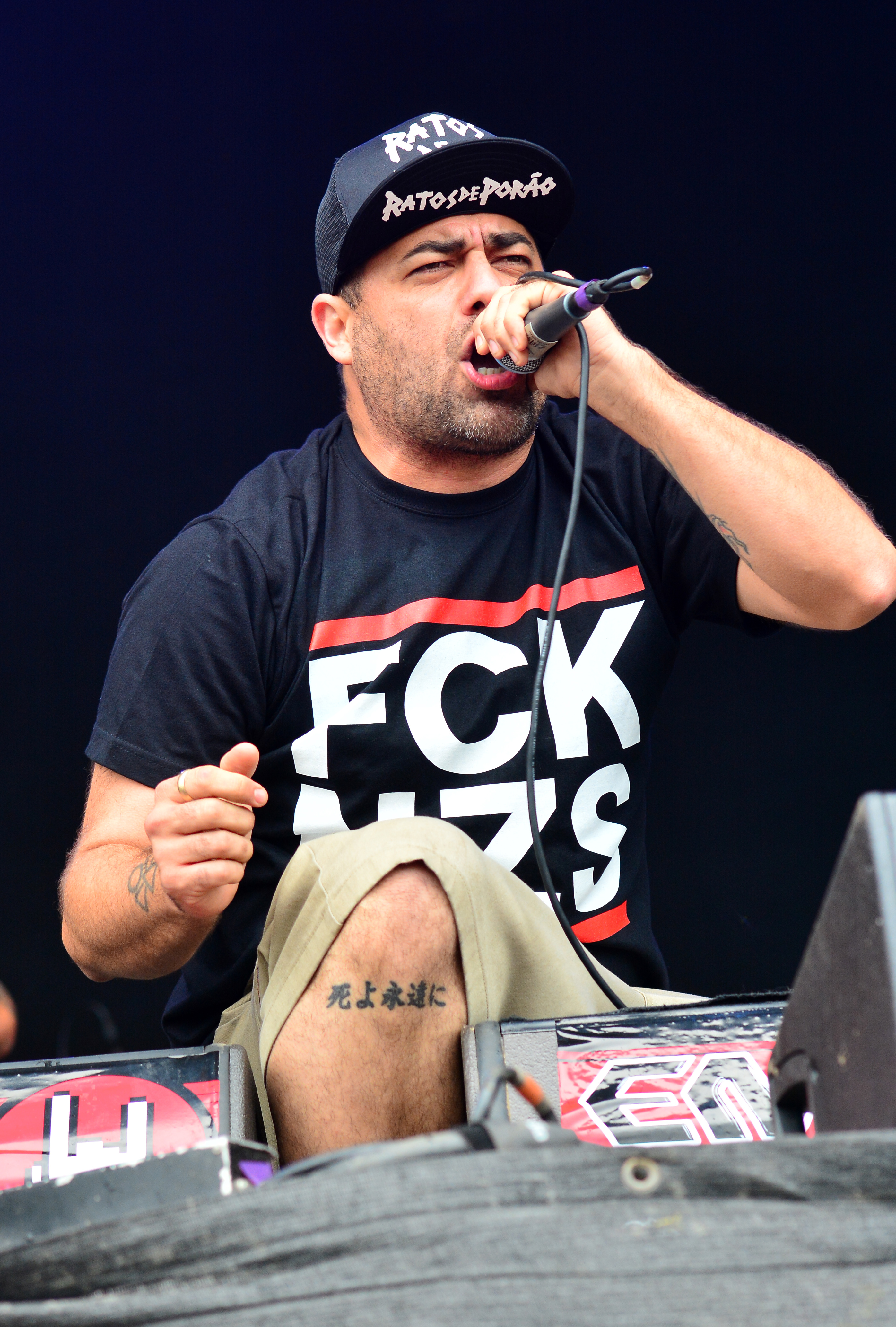 Death by Stereo beim Reload Festival 2015